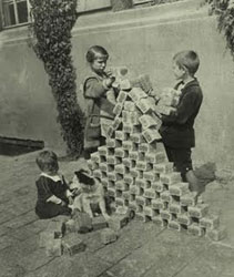 Een voorbeeld van hyperinflatie in Duitsland in de crisisjaren.